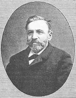 Stanislas Lépine par Louis Chrétiennot